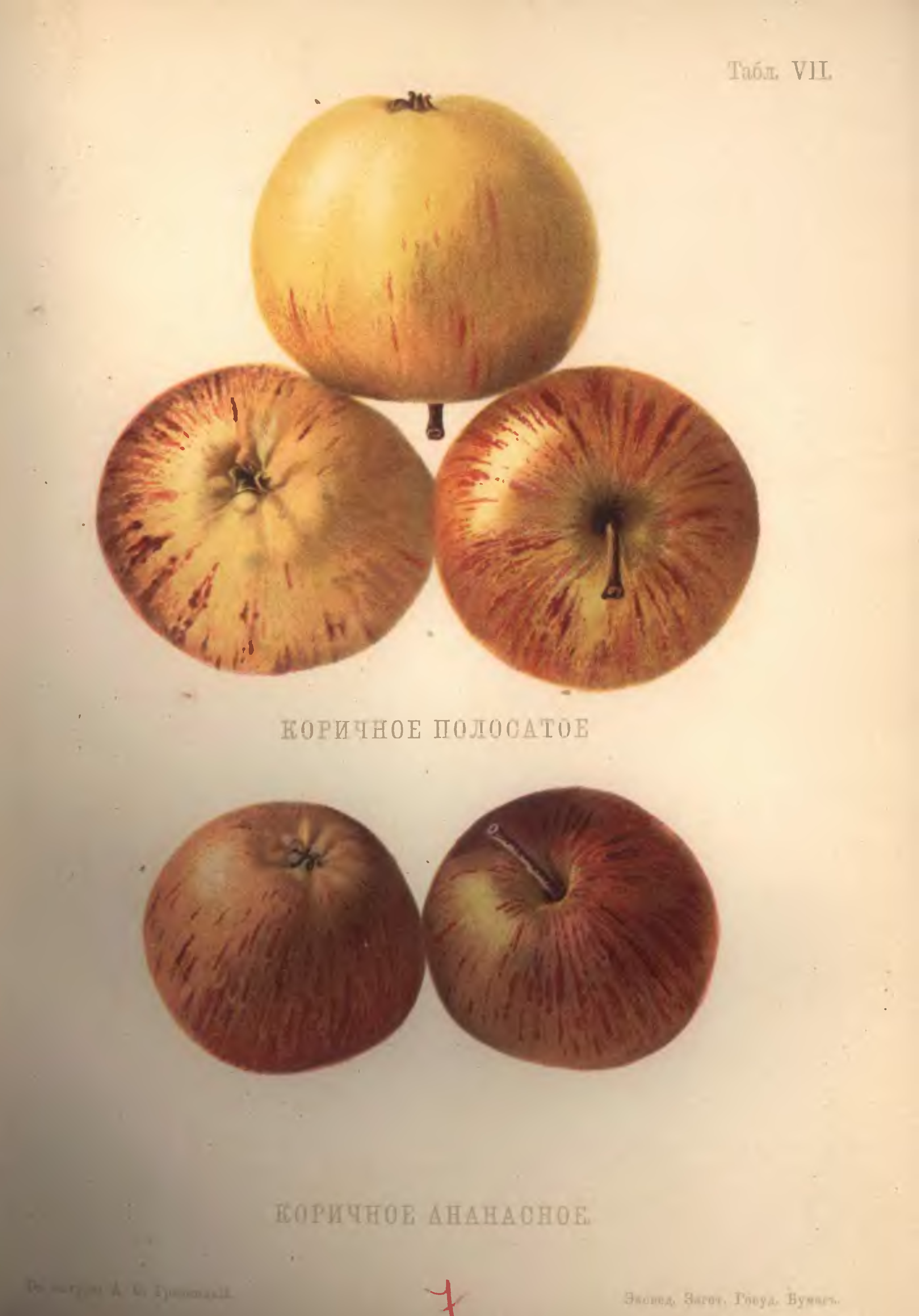 Коричное полосатое и Коричное ананасное